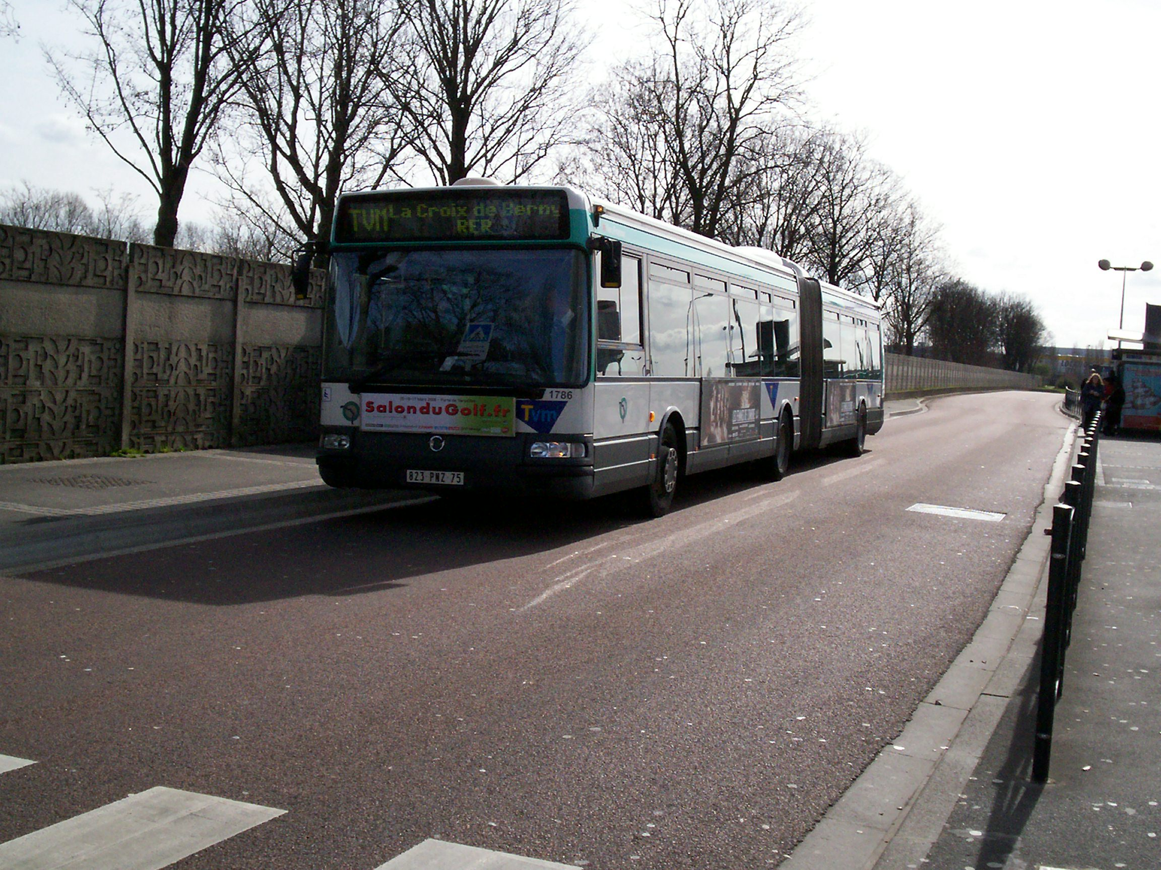 Bus TVM arrivant à "Belle Epine"